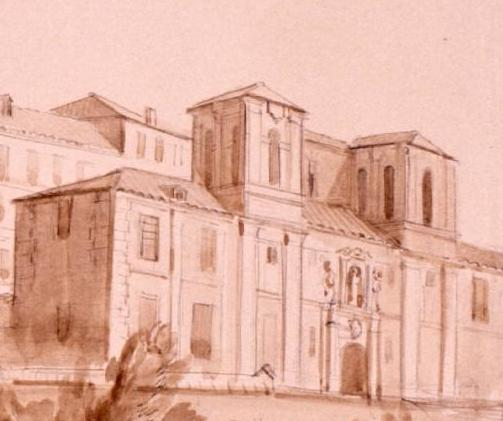 Vista del Cuarte de Conde-Duque y del desaparecido convento de San Joaquín -conocido como Nª Sra de los Afligidos- desde la zona de la actual calle Princesa.